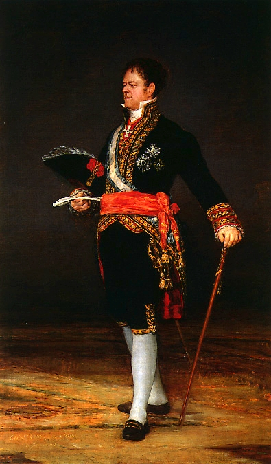 Retrato del aristócrata, militar y politico español José Miguel de Carvajal y Manrique (1771-1828), II duque de San Carlos y conde de Castillejo y del Puerto.